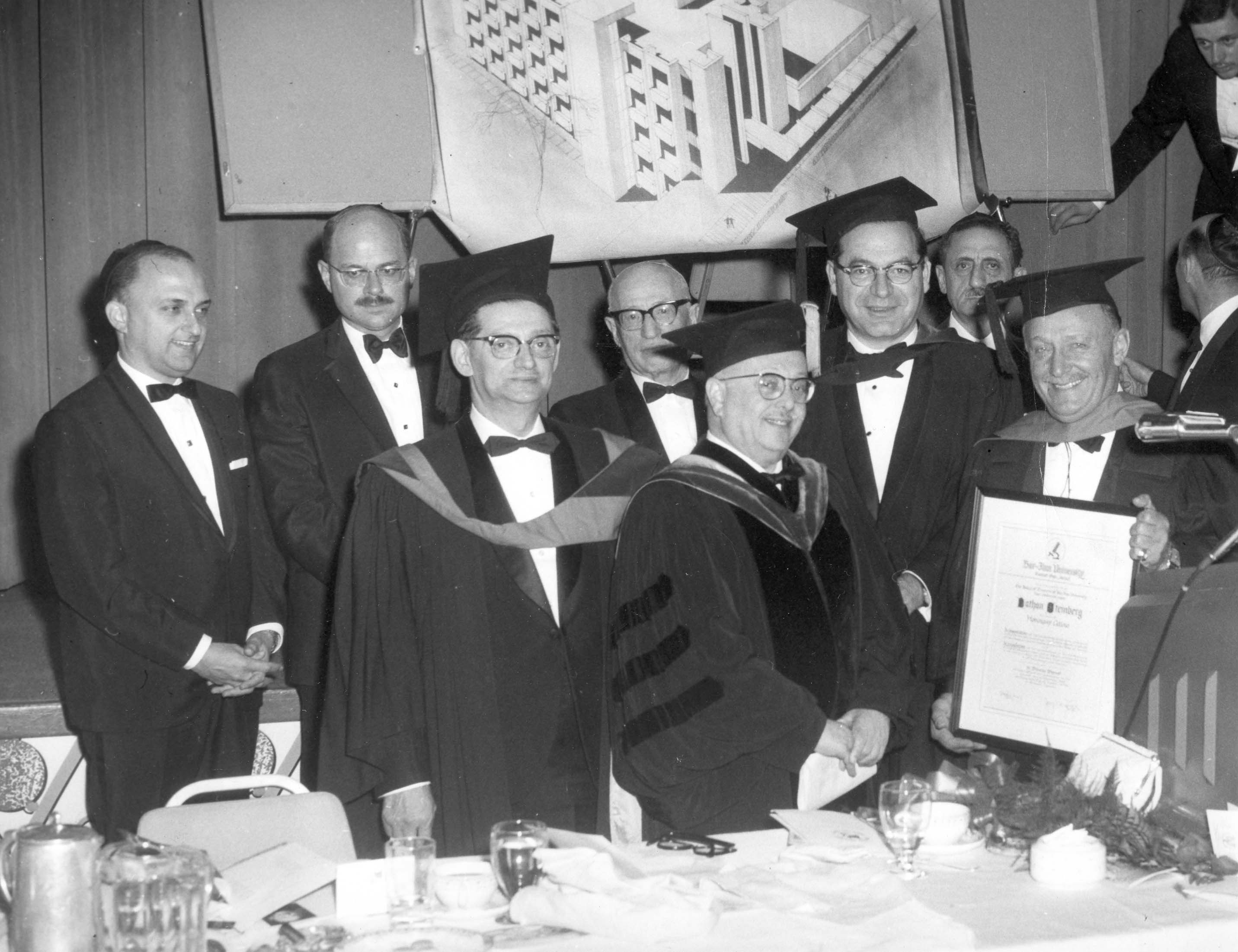 Rabbi Dr. Joseph H. Lookstein President 1957-1967